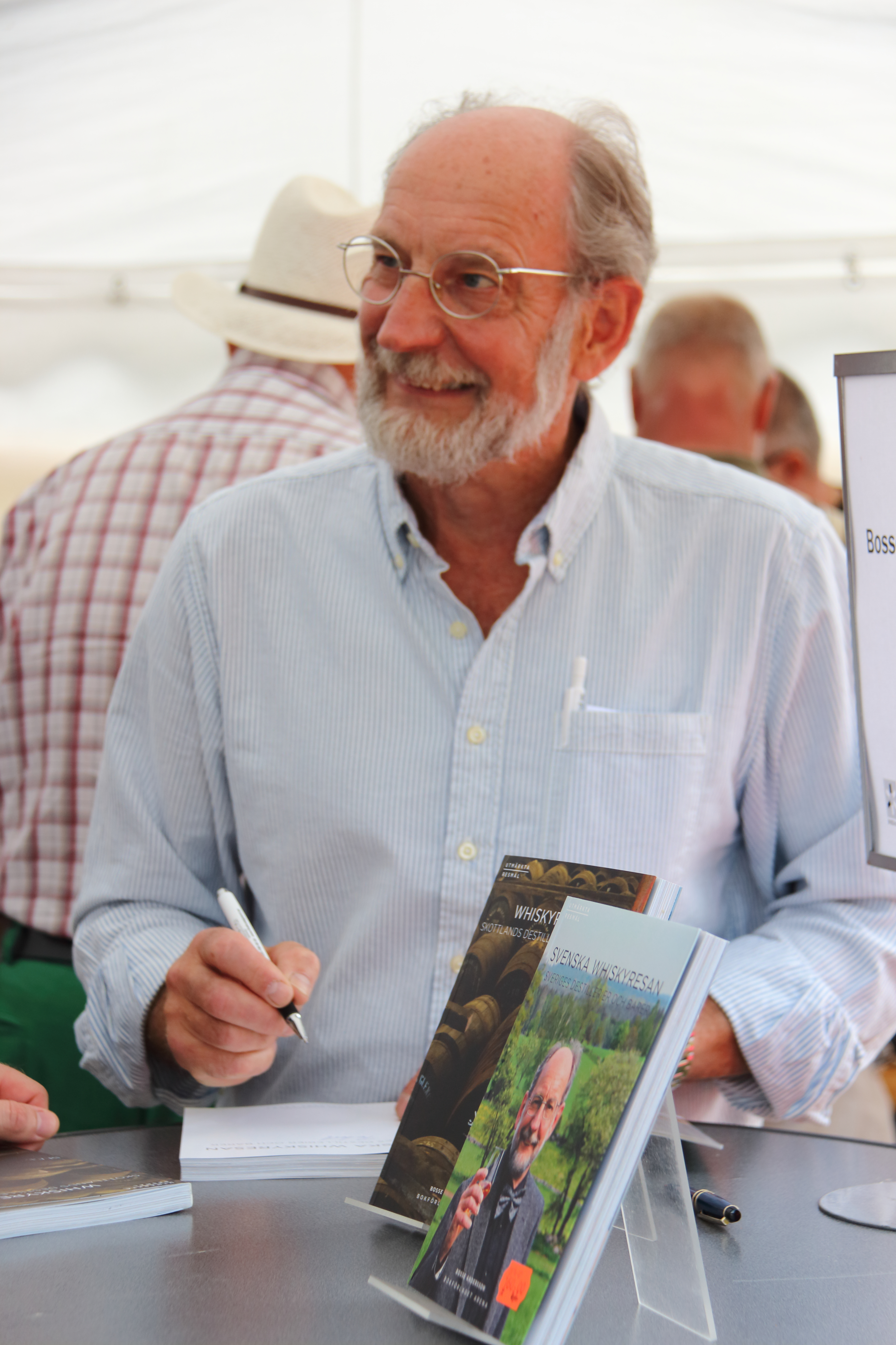 Bosse "Bildoktorn" Andersson på Författardagarna 2014, Kulturmagasinet i Åmål.